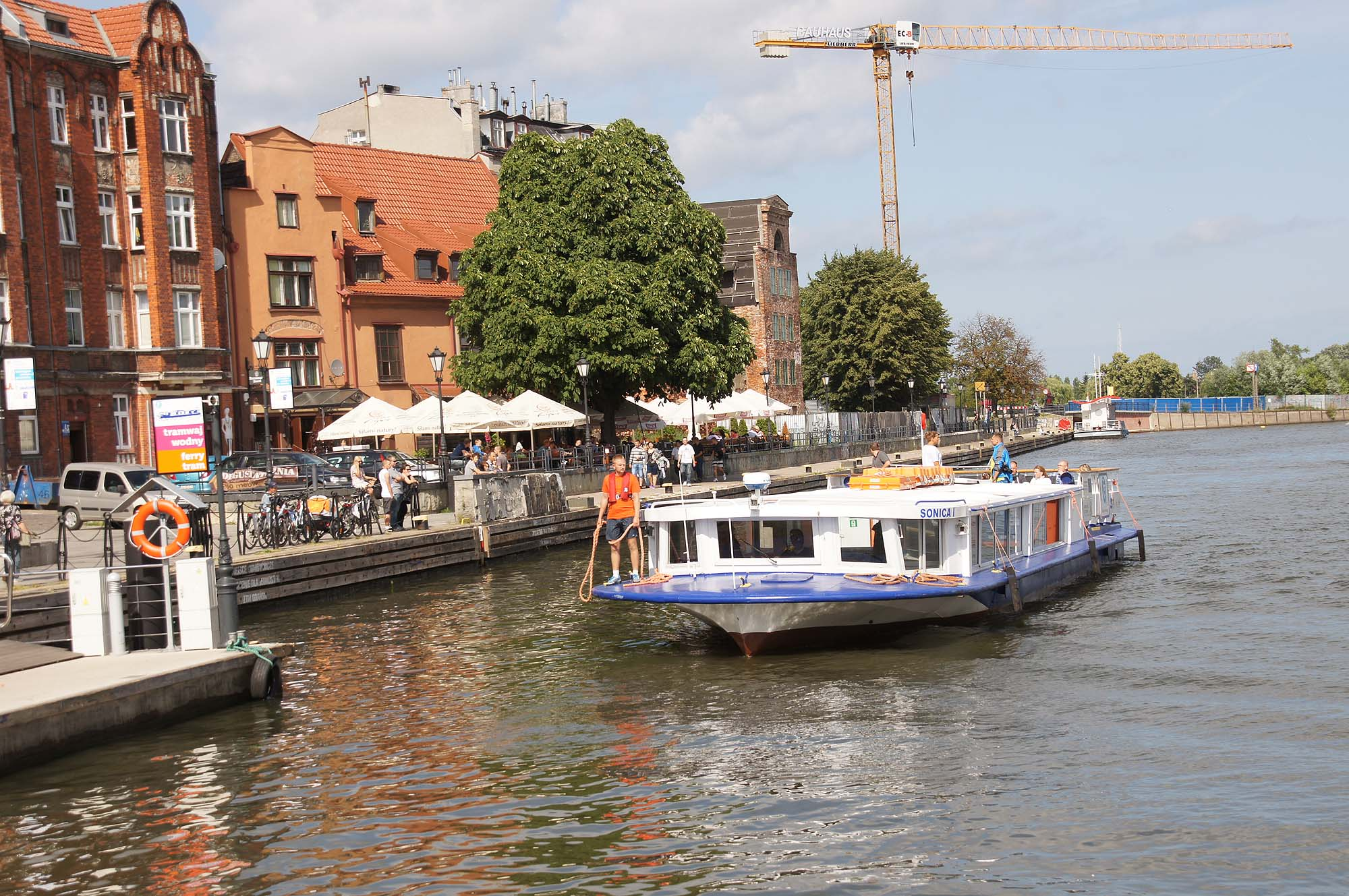 Gdańsk, ulica Wartka nad Motławą